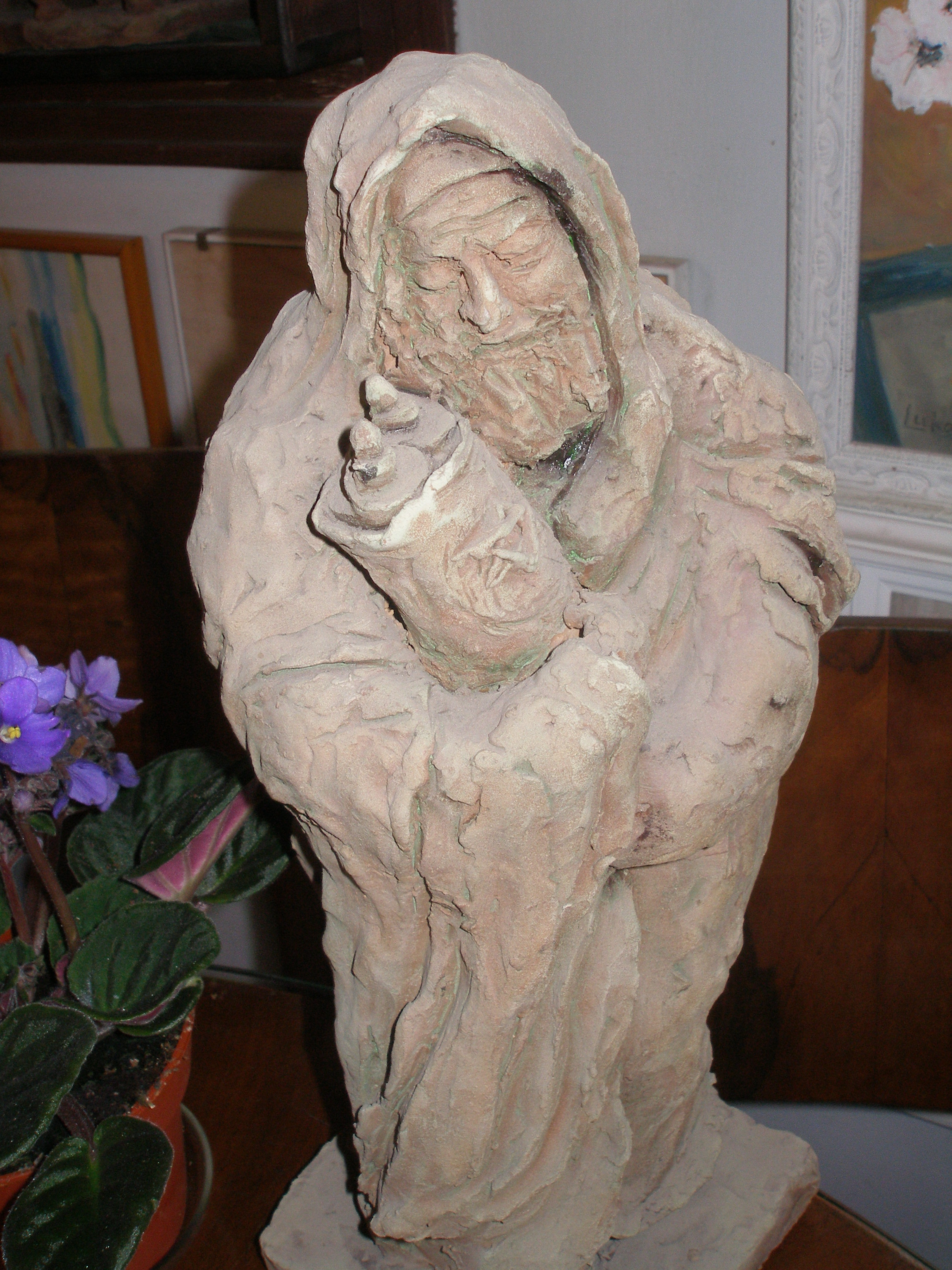 פסל שיצרה האמנית לוקה וקס מתל אביב בתערוכה שנערכה במכון ז'בוטינסקי